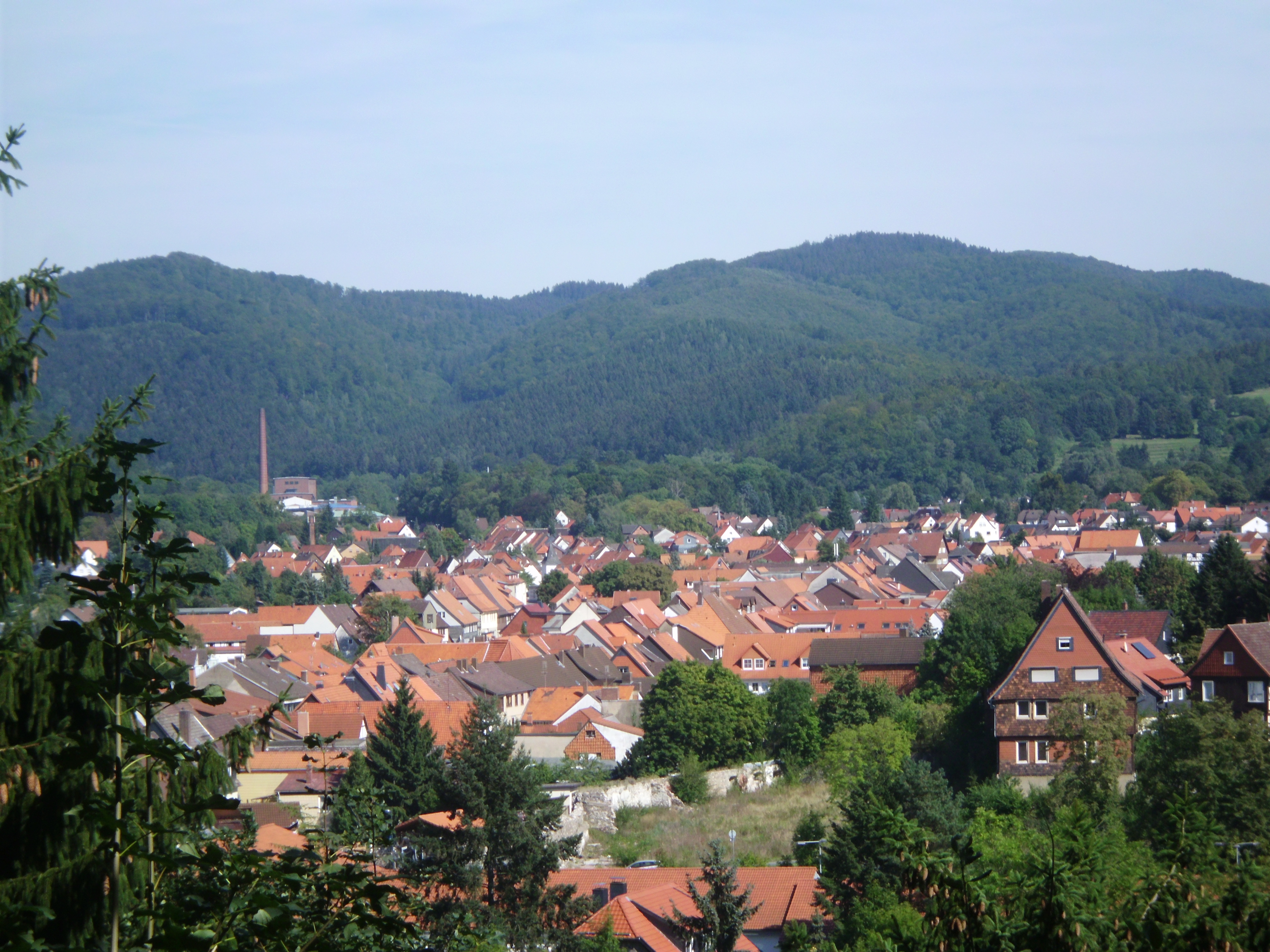 Blick auf Herzberg am Harz von unterhalb des Schlosses westlich der Stadt, Landkreis Osterode am Harz